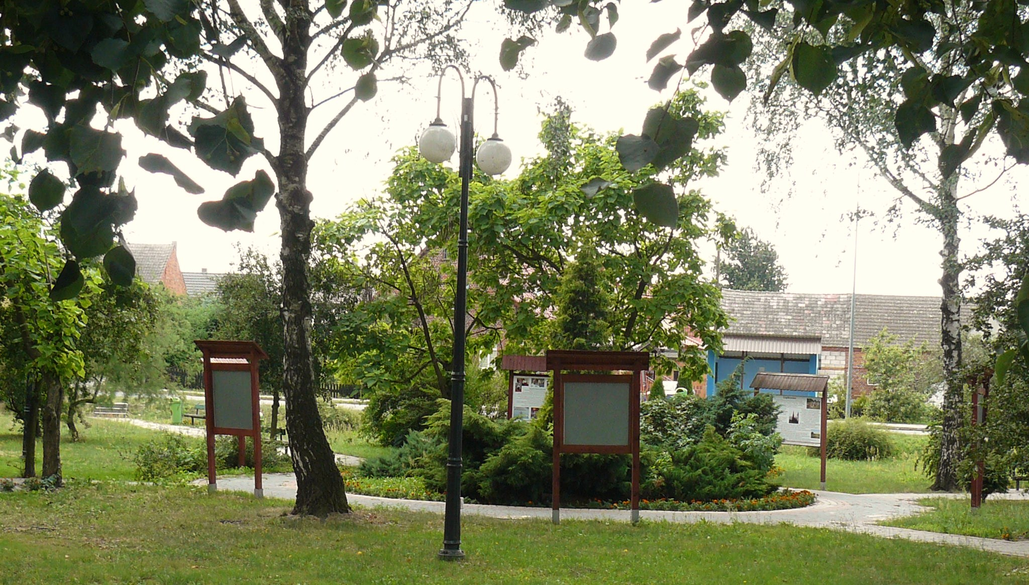 Gądkowice.